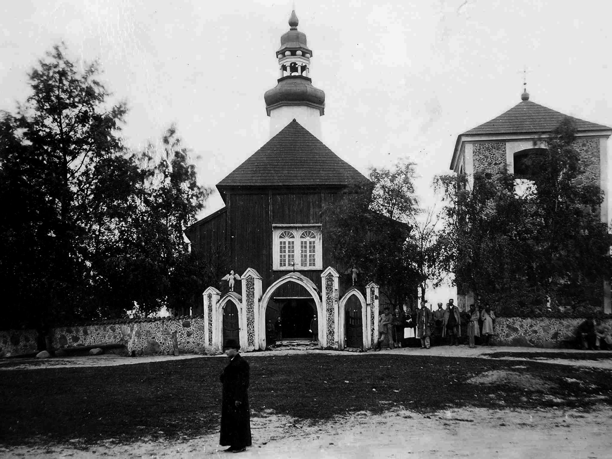 Беларуская (тарашкевіца): Адэльск (Adelsk). Касьцёл